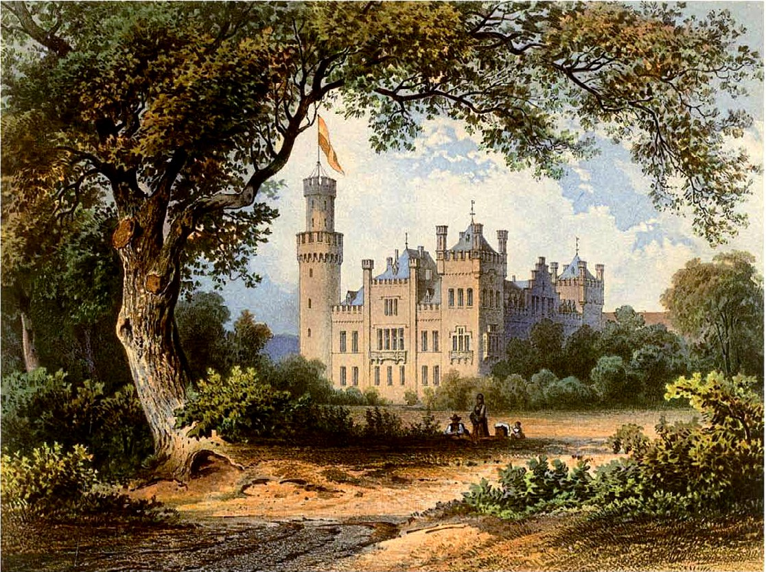 Schloss Herdringen, Lithografie aus dem 19. Jahrhundert